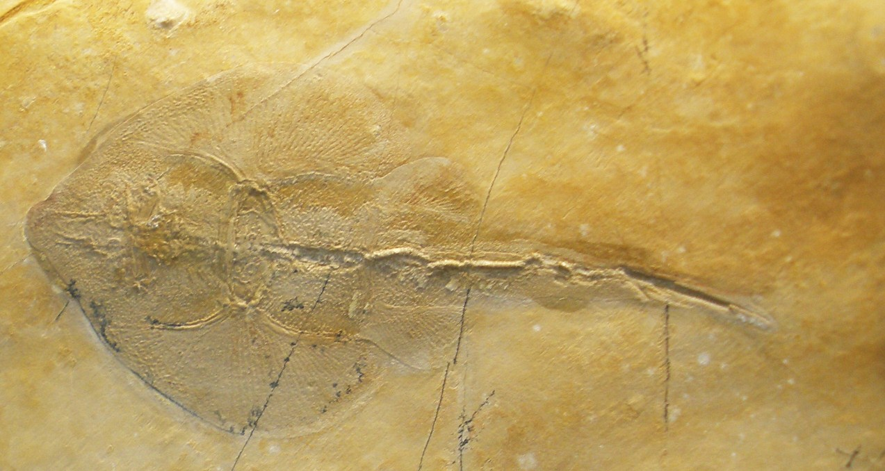 Fossil of Belemnobatis, an extinct fish. Took the photo at Musee d'Histoire Naturelle, Brussels